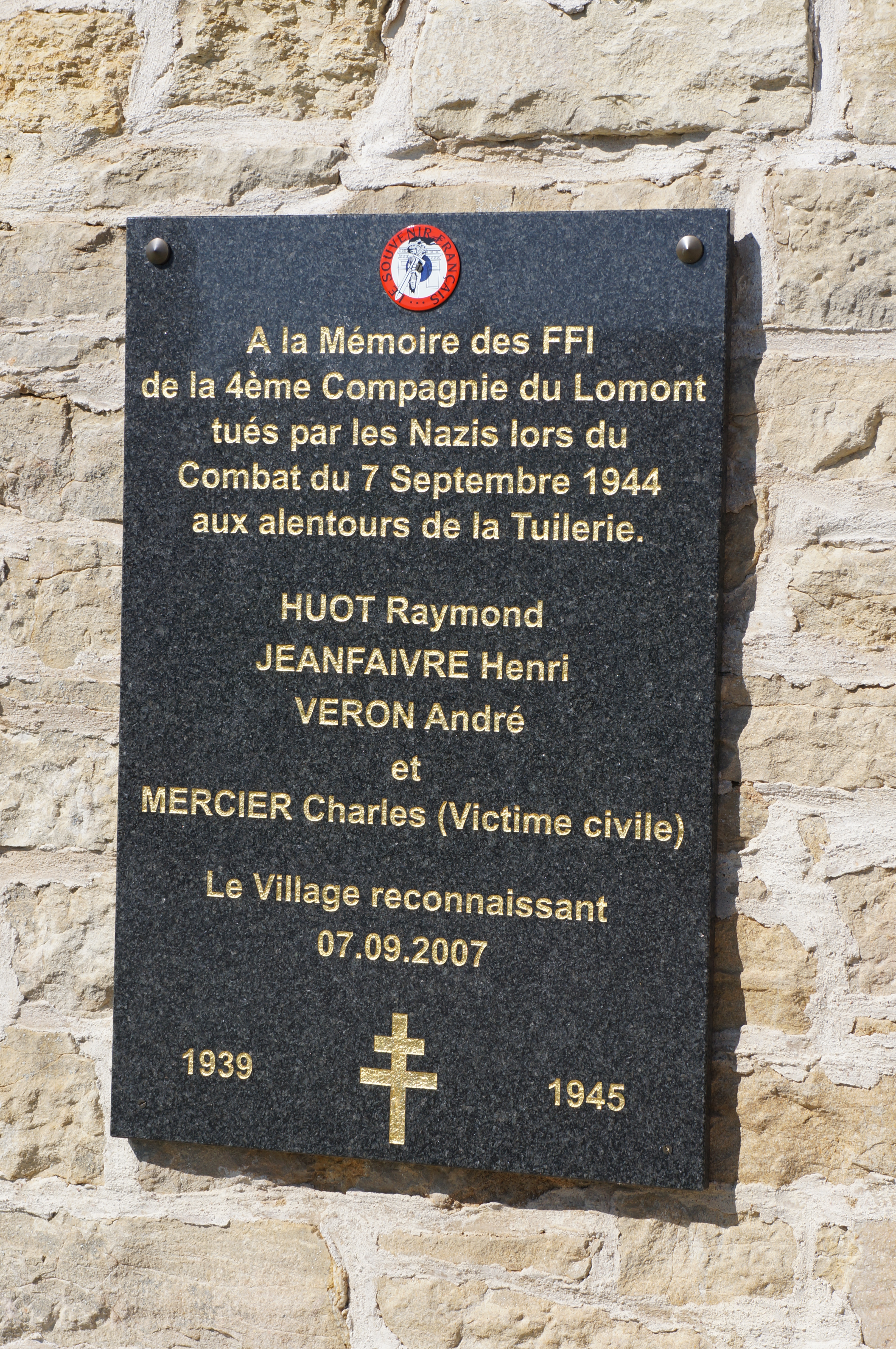 Plaque commémorative sur le four à brique d'Abbevillers (Doubs, France).